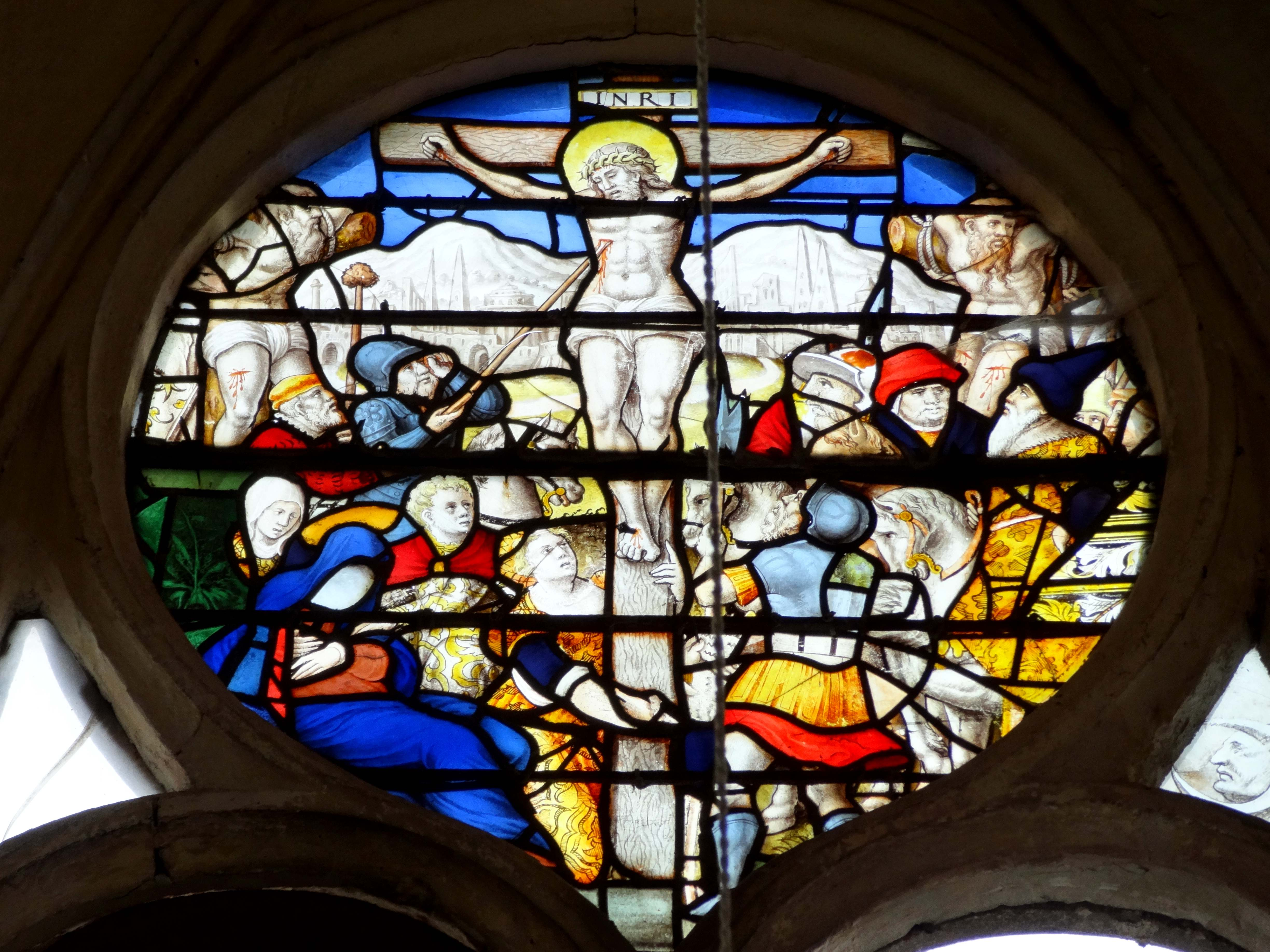 Vitrail de l'église - voir titre.